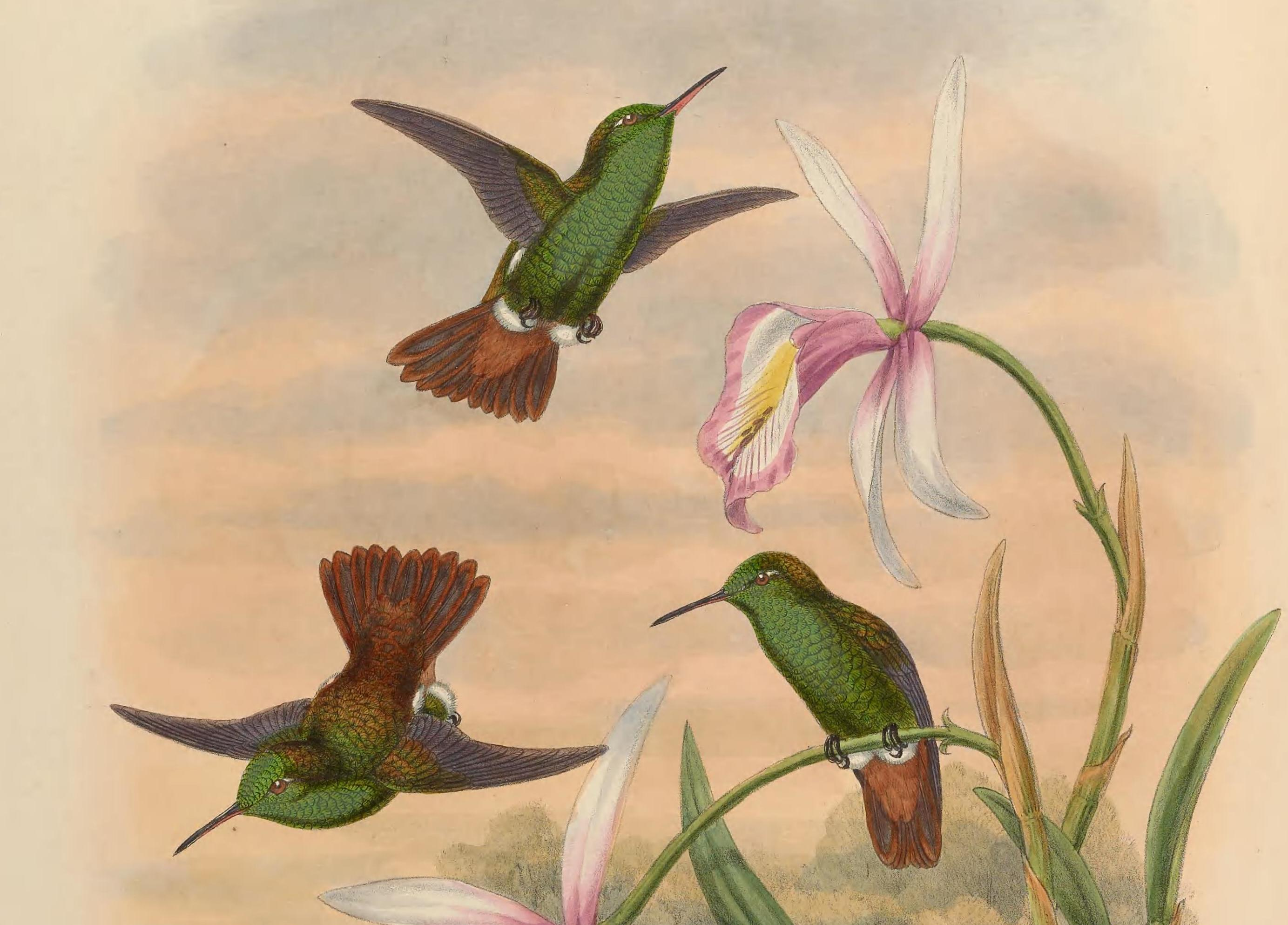 Amazilia cupreicauda = Amazilia viridigaster cupreicauda [1]